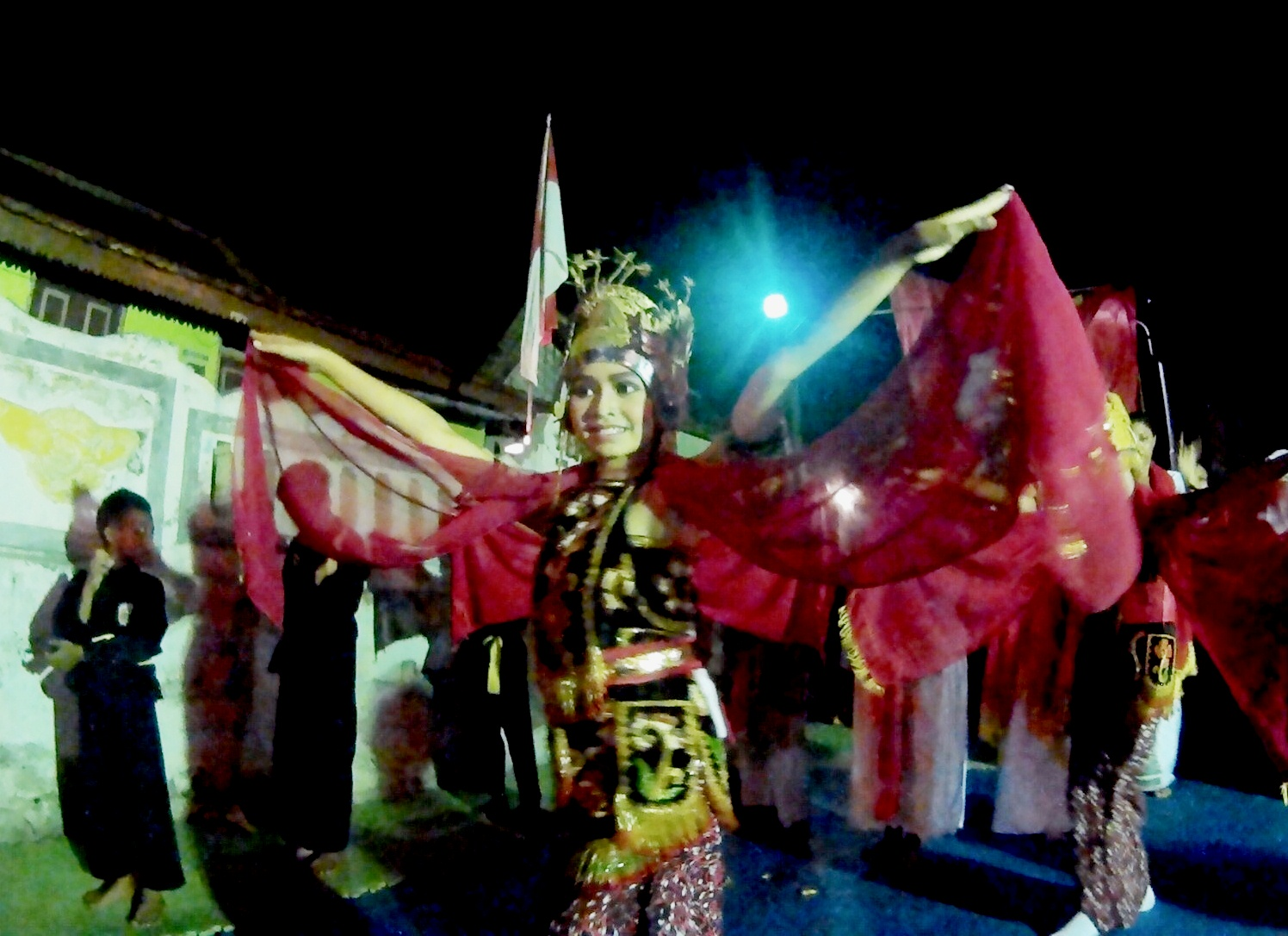 Tari Gandrung yang dimainkan dalam pementasan Motion and Dance Retreat